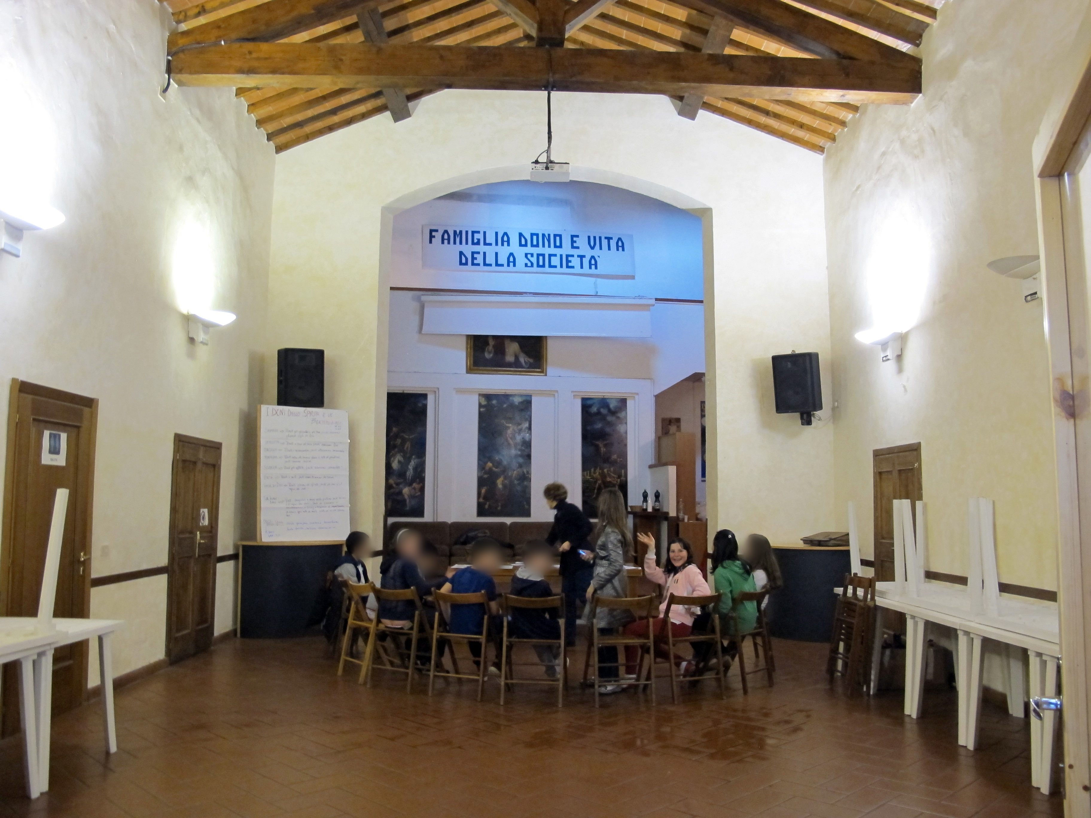 Santi Crispino e Crespiniano, interno